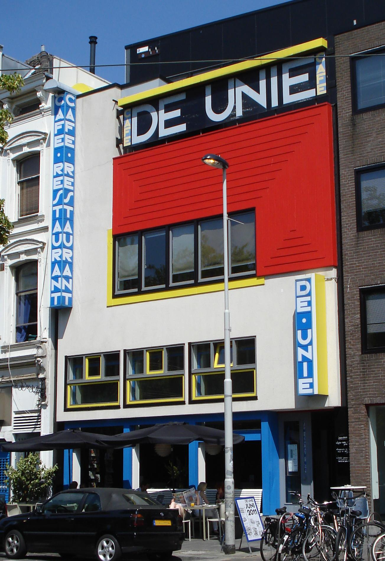 Rotterdam, Mauritsweg. Café De Unie. 2011.